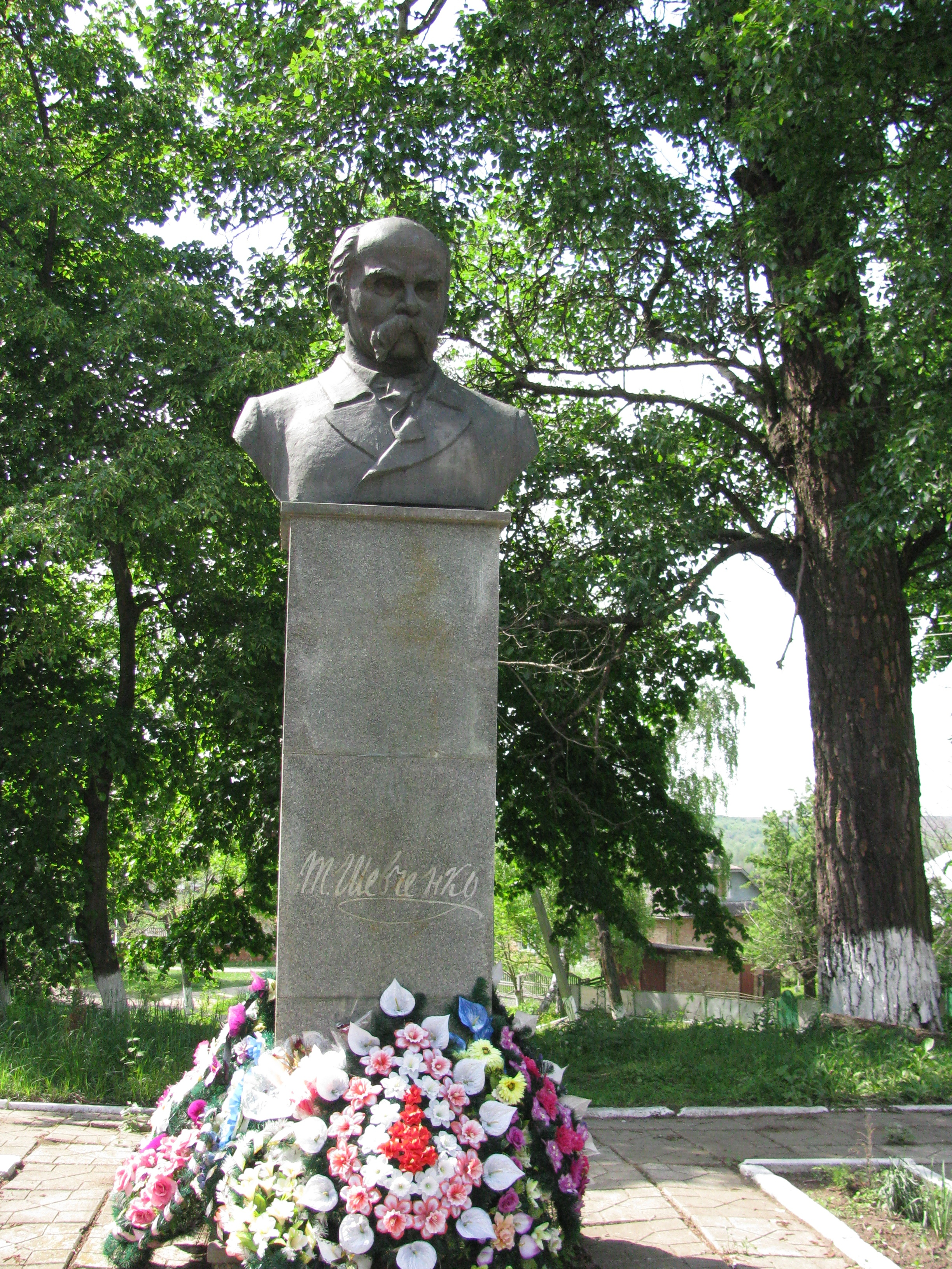 Памятник Т.Г. Шевченку